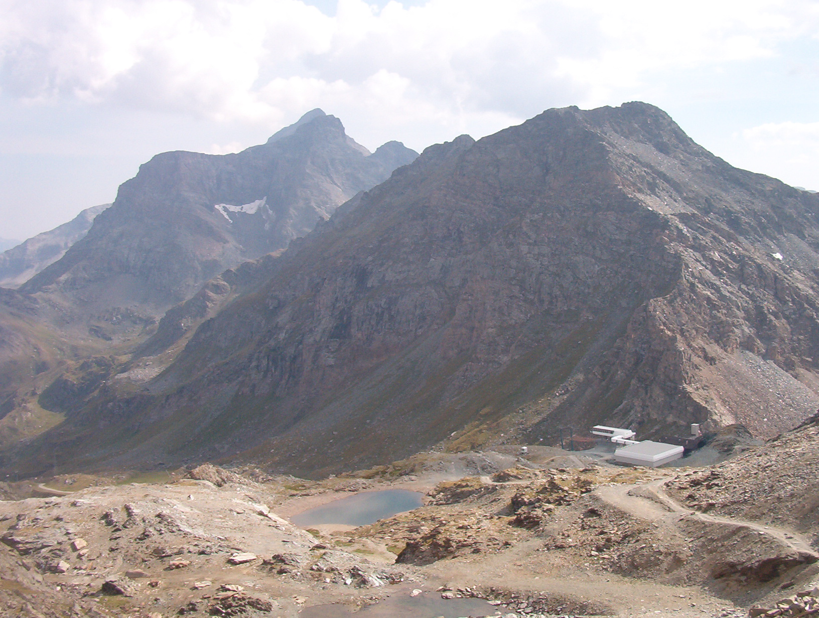 Colle Bettaforca - Alpi Pennine - Italy